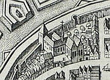 Gryphiswaldia: Greifswald. - Vogelschau, Ausschnitt aus der historischen Ortsansicht mit der idealisierten Ansicht des Franziskanerklosters.